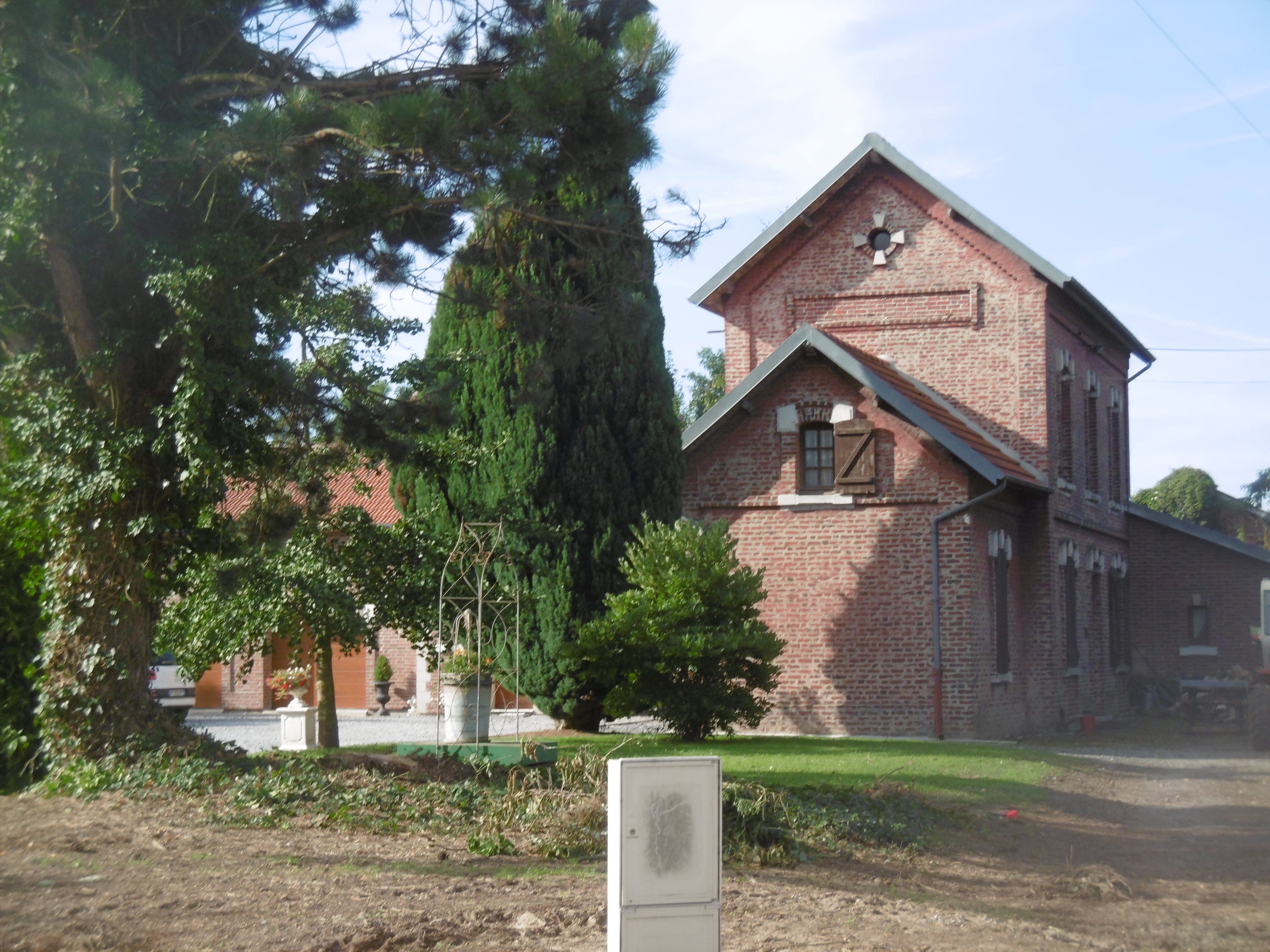 Gare d'Etreillers sur ligne St-Quentin Ham maison en 2019